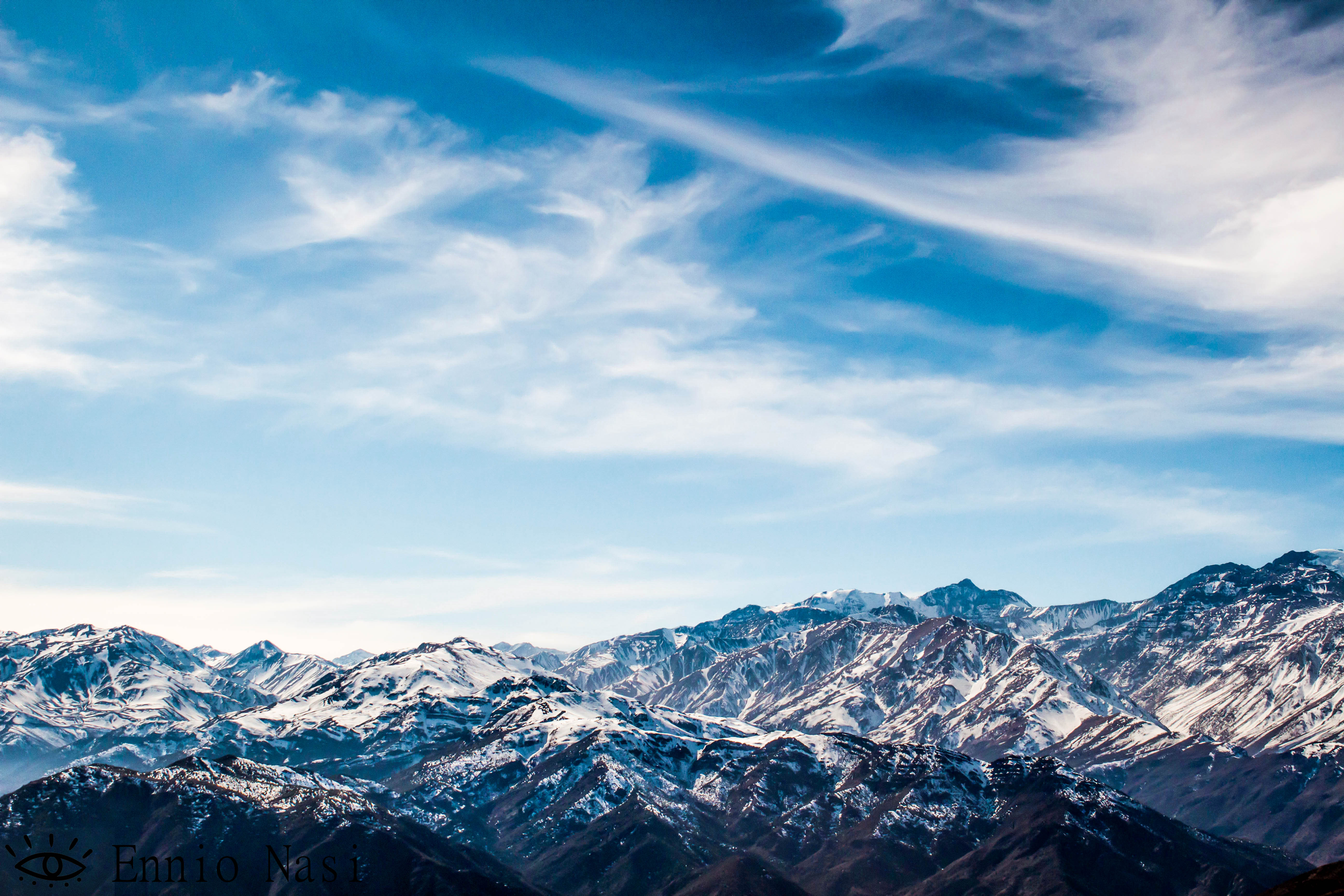 Vista de montañas desde la cima del cerro Provincia en la Región Metropolitana, Chile.